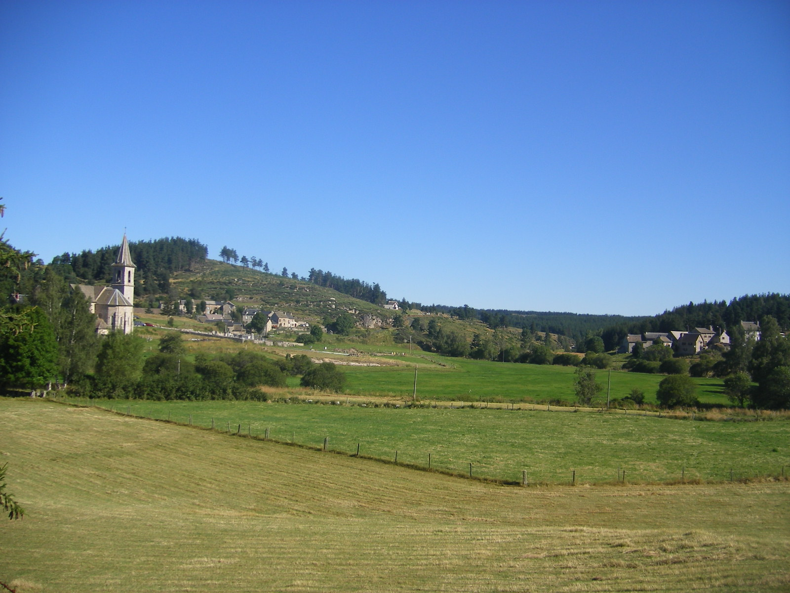 Javols